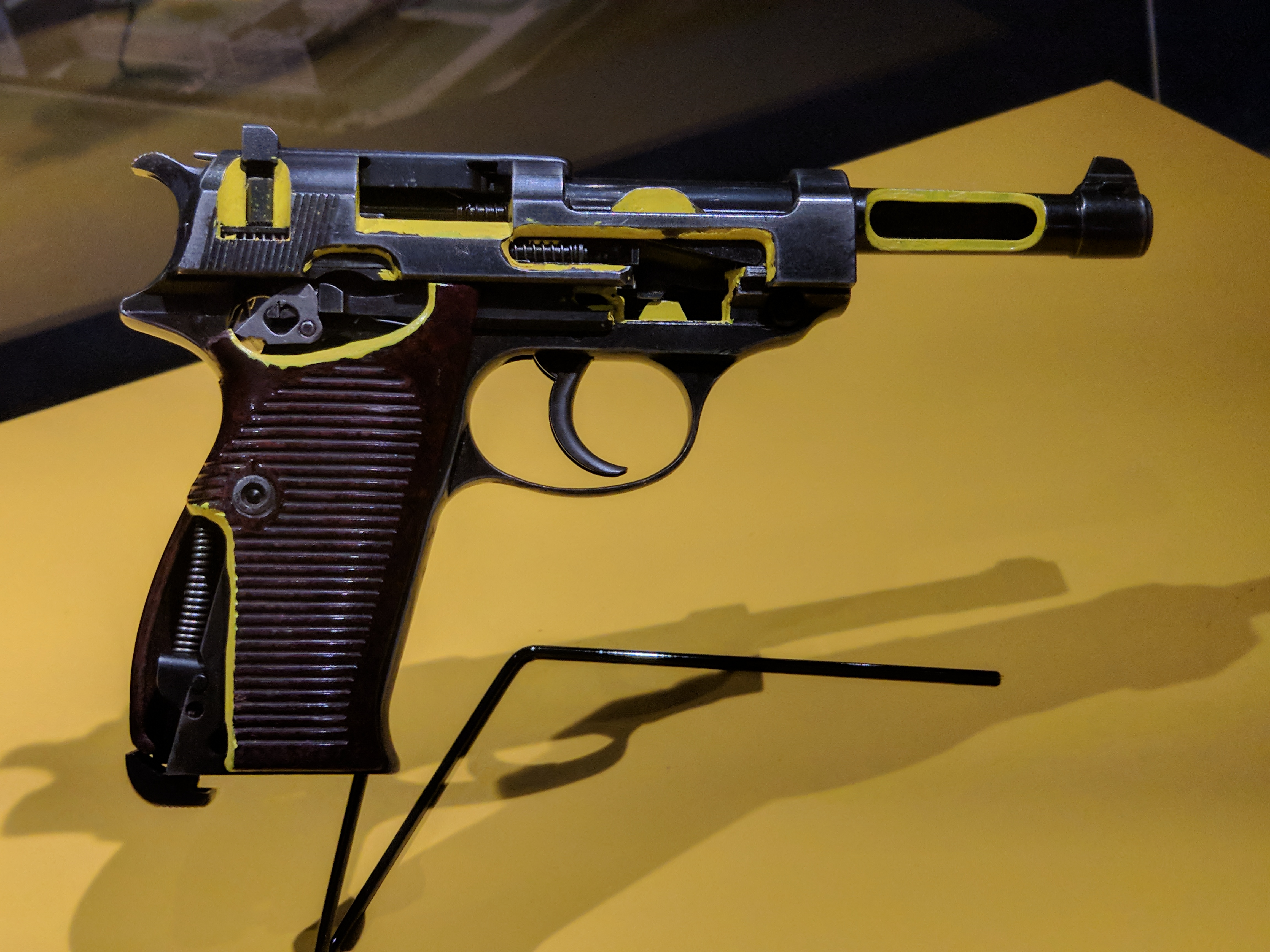 Prerez nemške pištole Walther P38